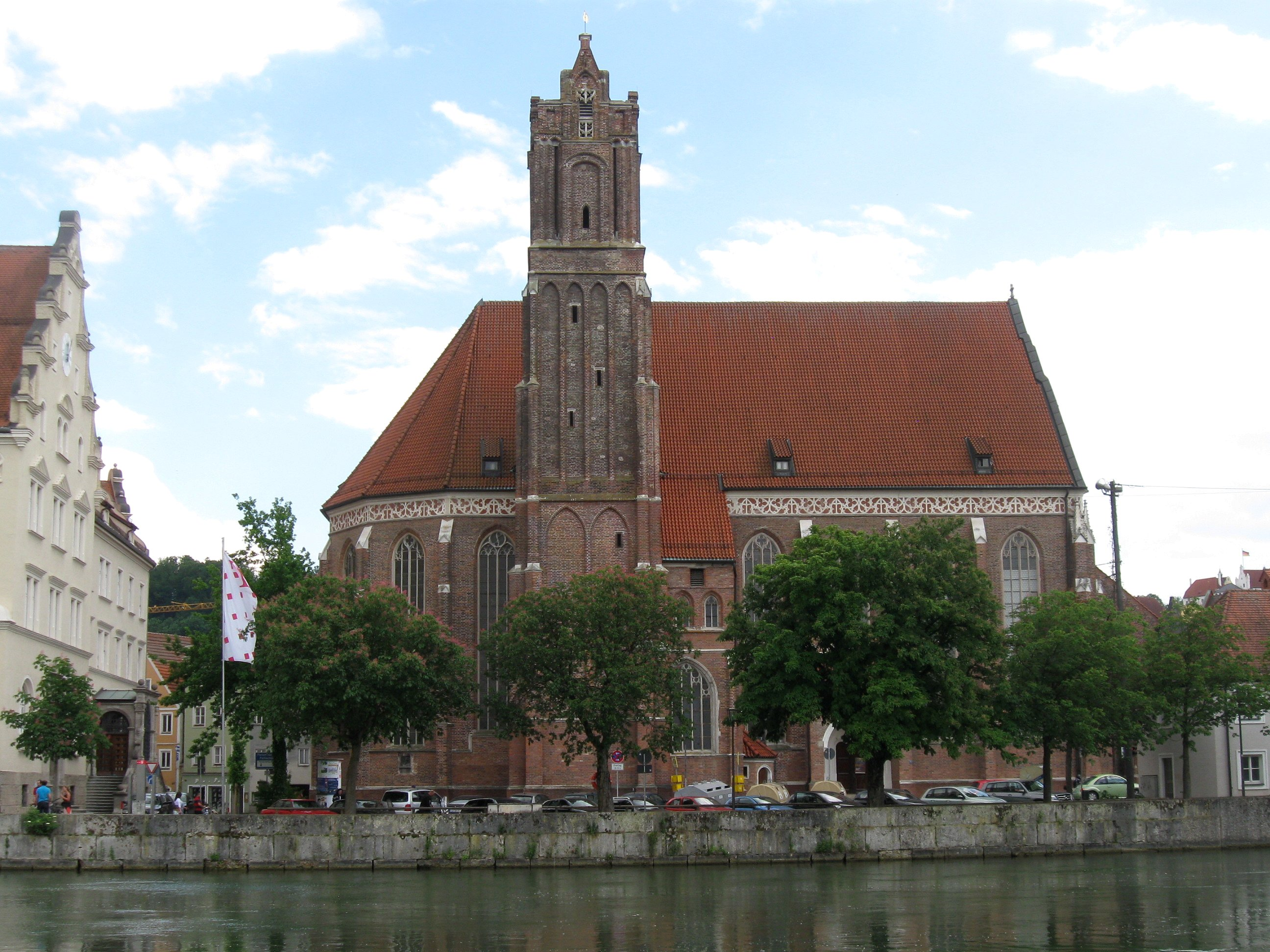 Heilig-Geist-Gasse 394; Ehem. katholische Spitalkirche Heiliggeist, spätgotische Hallenkirche mit Hallenumgangschor und ausspringendem Nordturm, erbaut von Hans von Burghausen und Hans Stethaimer, 1407 bis 1461; mit Ausstattung. D-2-61-000-229